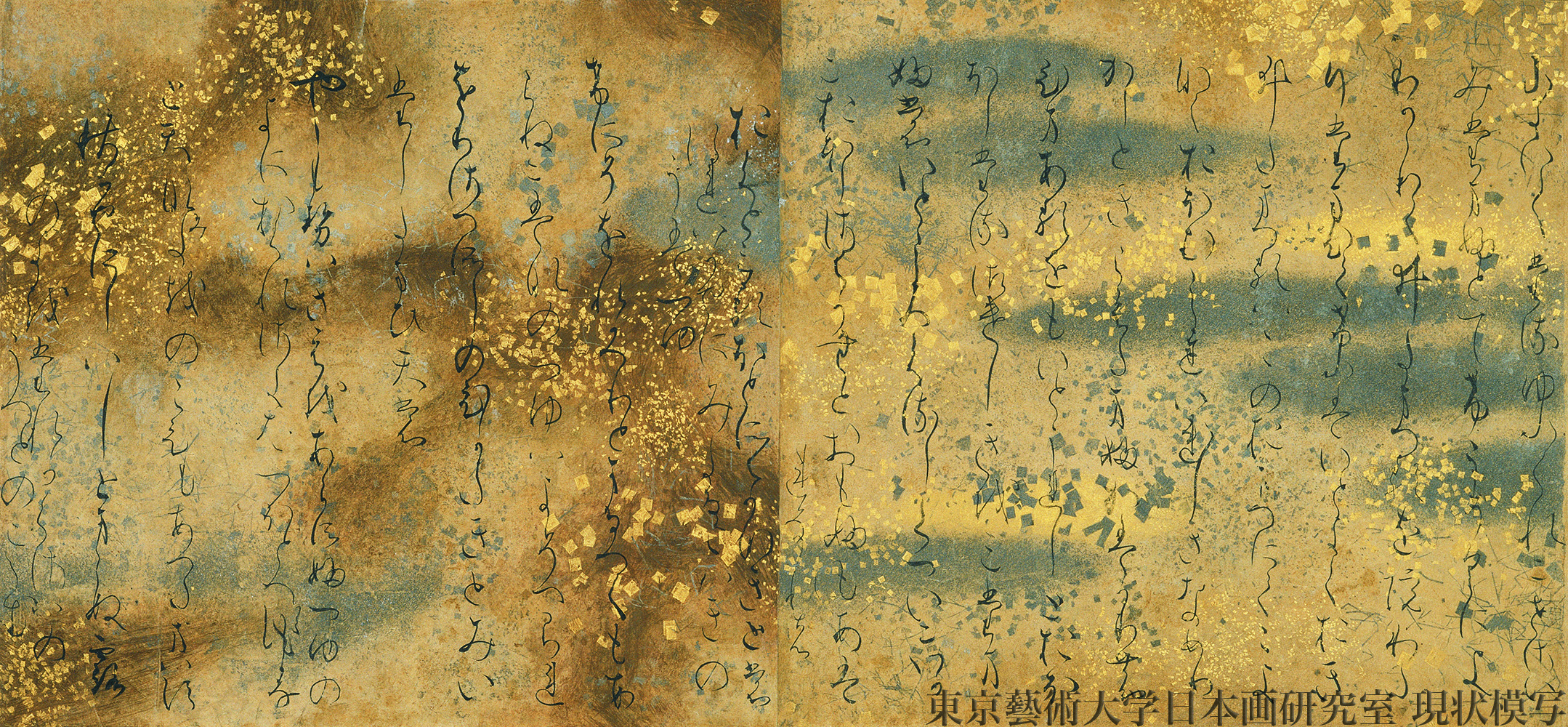 紙本墨色／一面 平安時代後期・12世紀 縦21.8cm 横47.5cm 五島美術館蔵